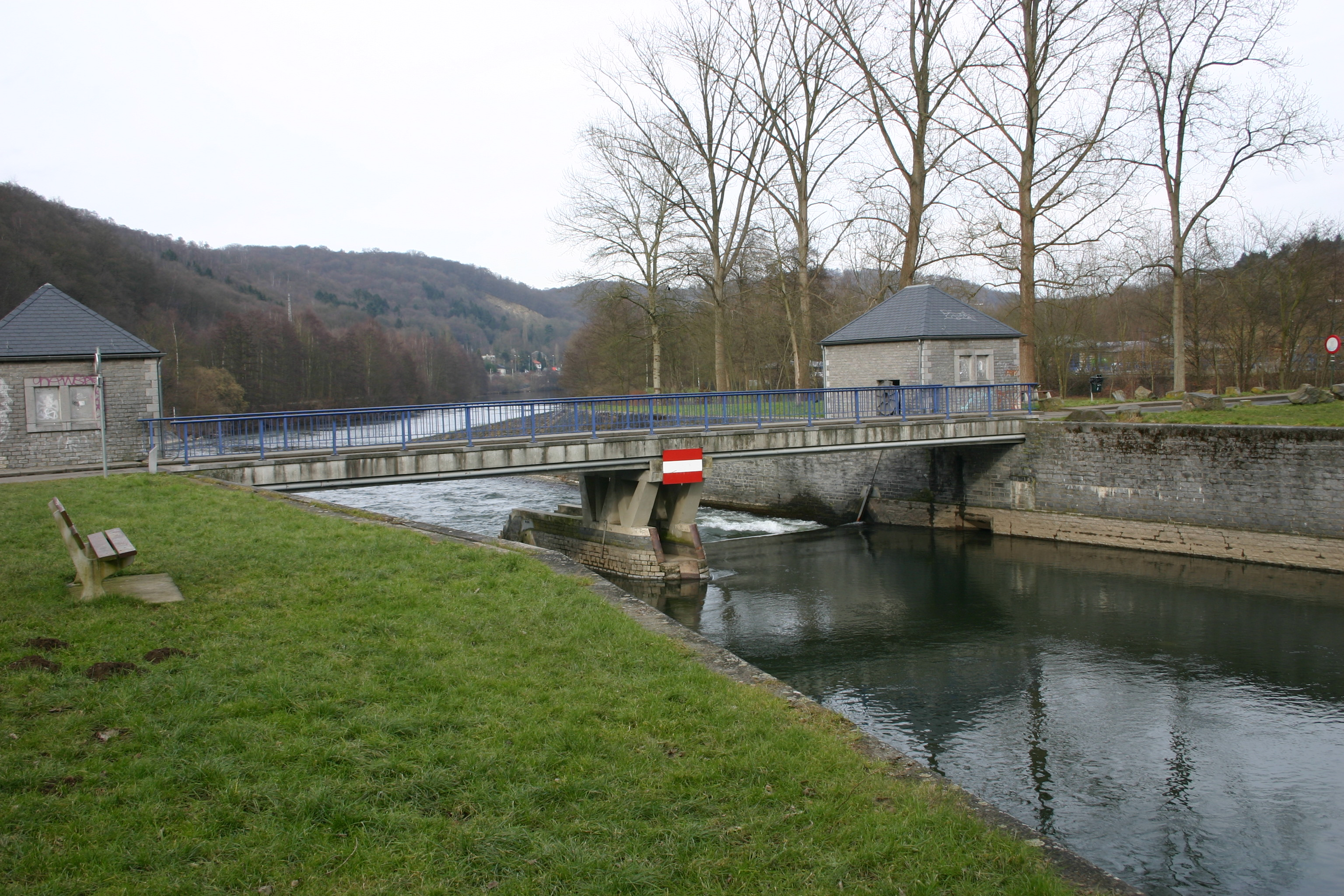 Schleis N° 5 oder och Schleis vun Colonster: Schleis ass durch én automatischt beweglicht Wier ersaat ginn.